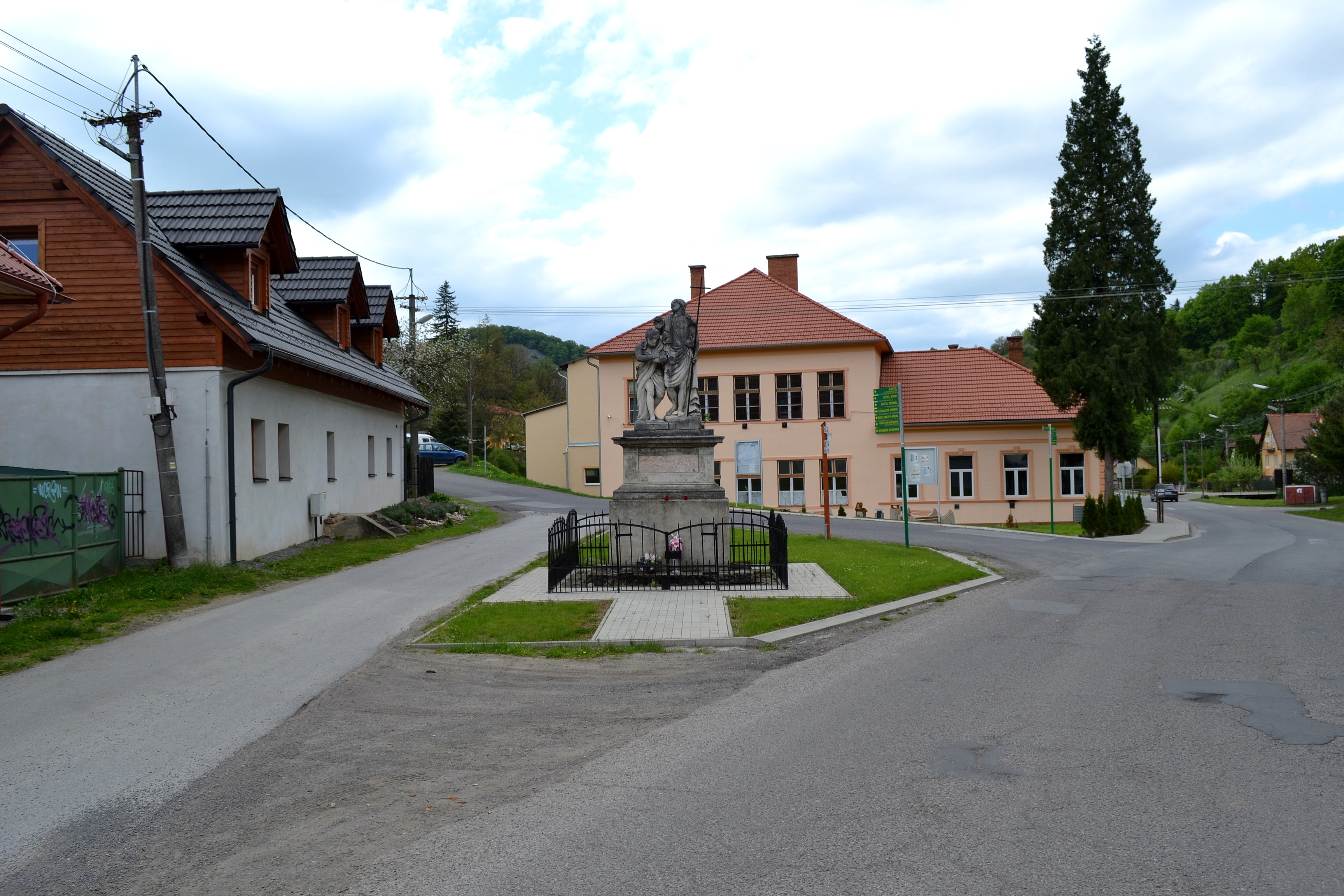 Pohľad na centrum obce Vyhne (okr. Žiar nad Hronom)